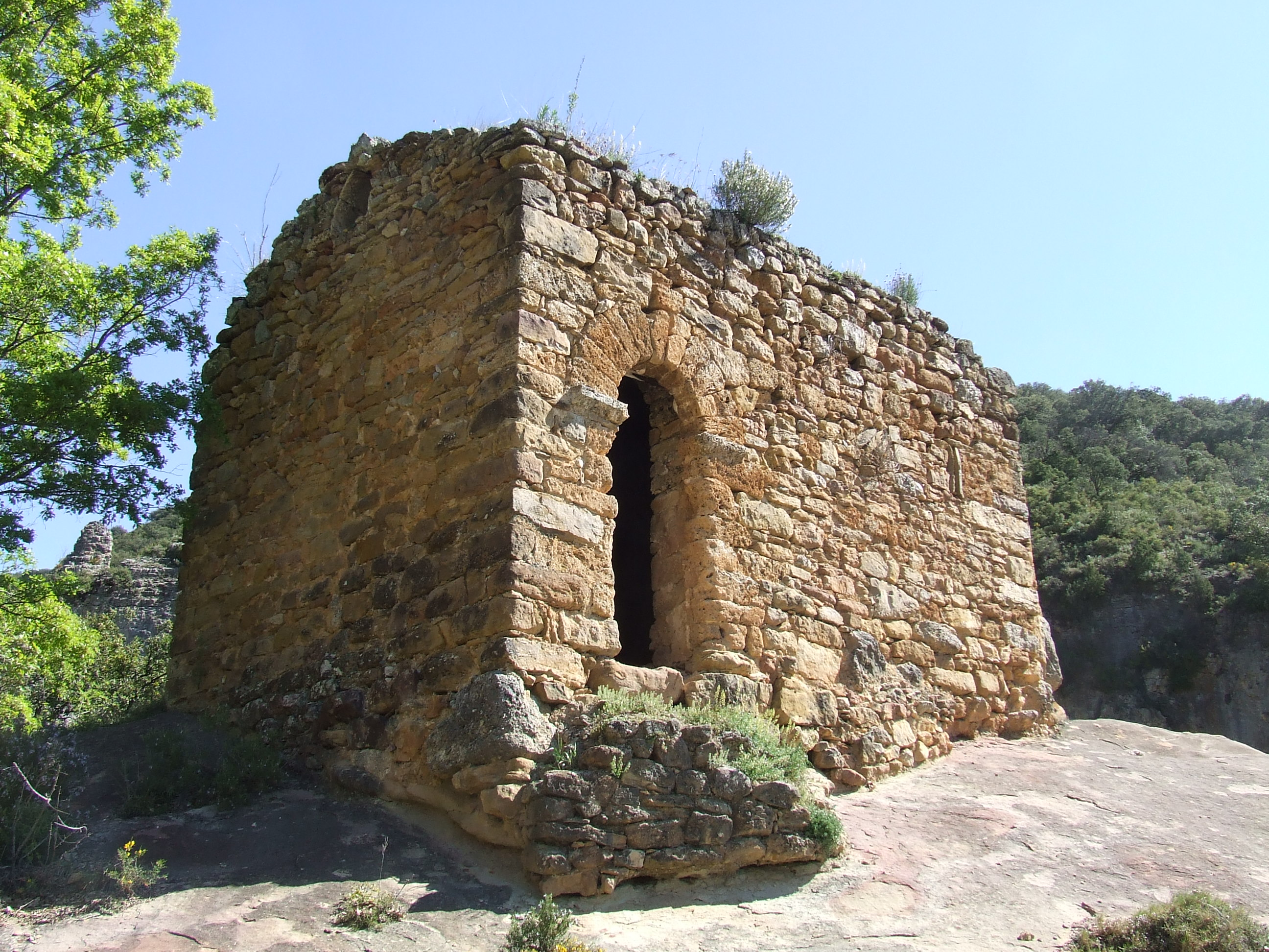 Sant Martí de Gurp (Gurp de la Conca, Tremp, Pallars Jussà)